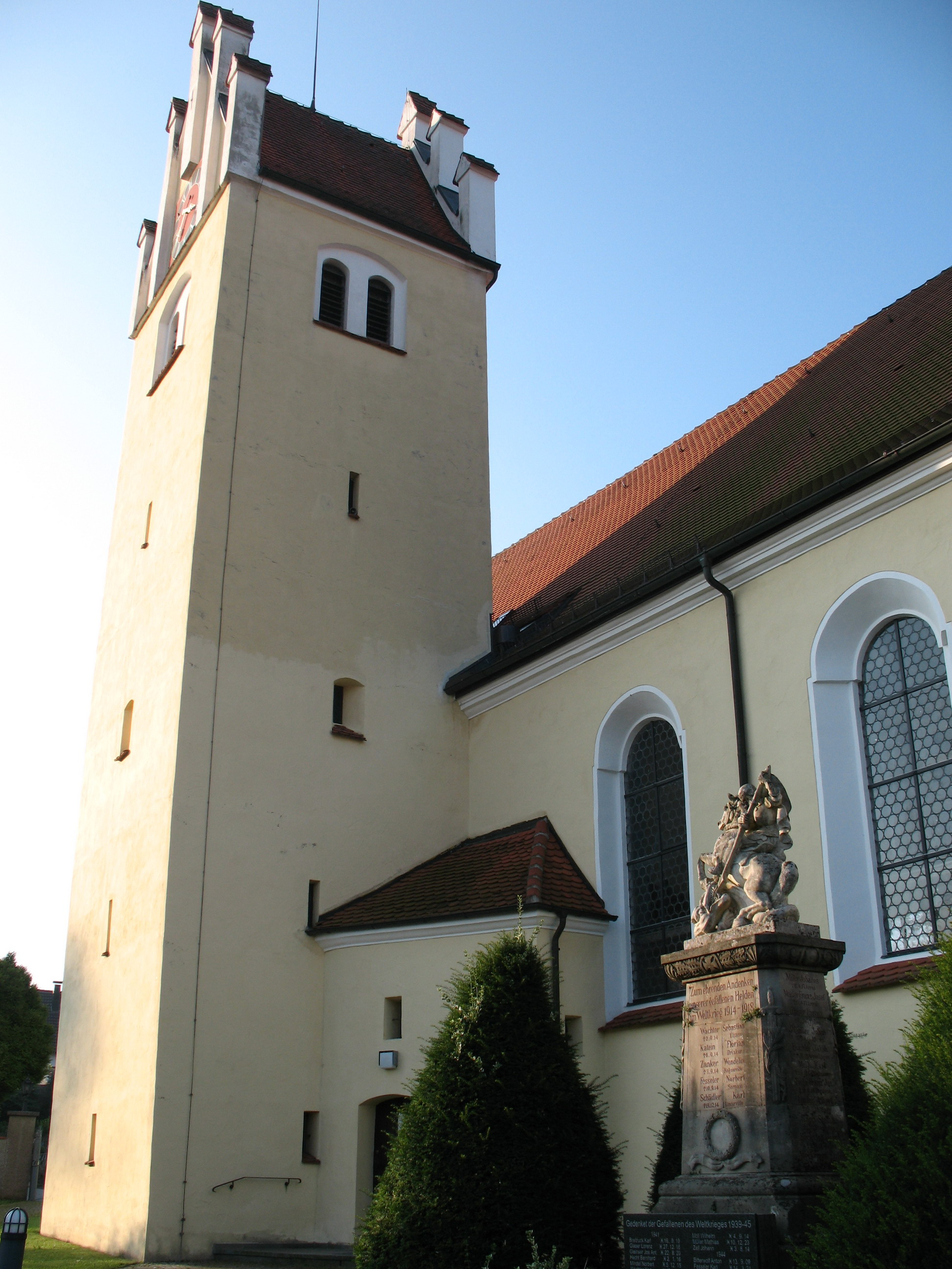 Die Kirche St. Jakobus & Pelagius von Laupertshausen in der Nord- Ansicht.